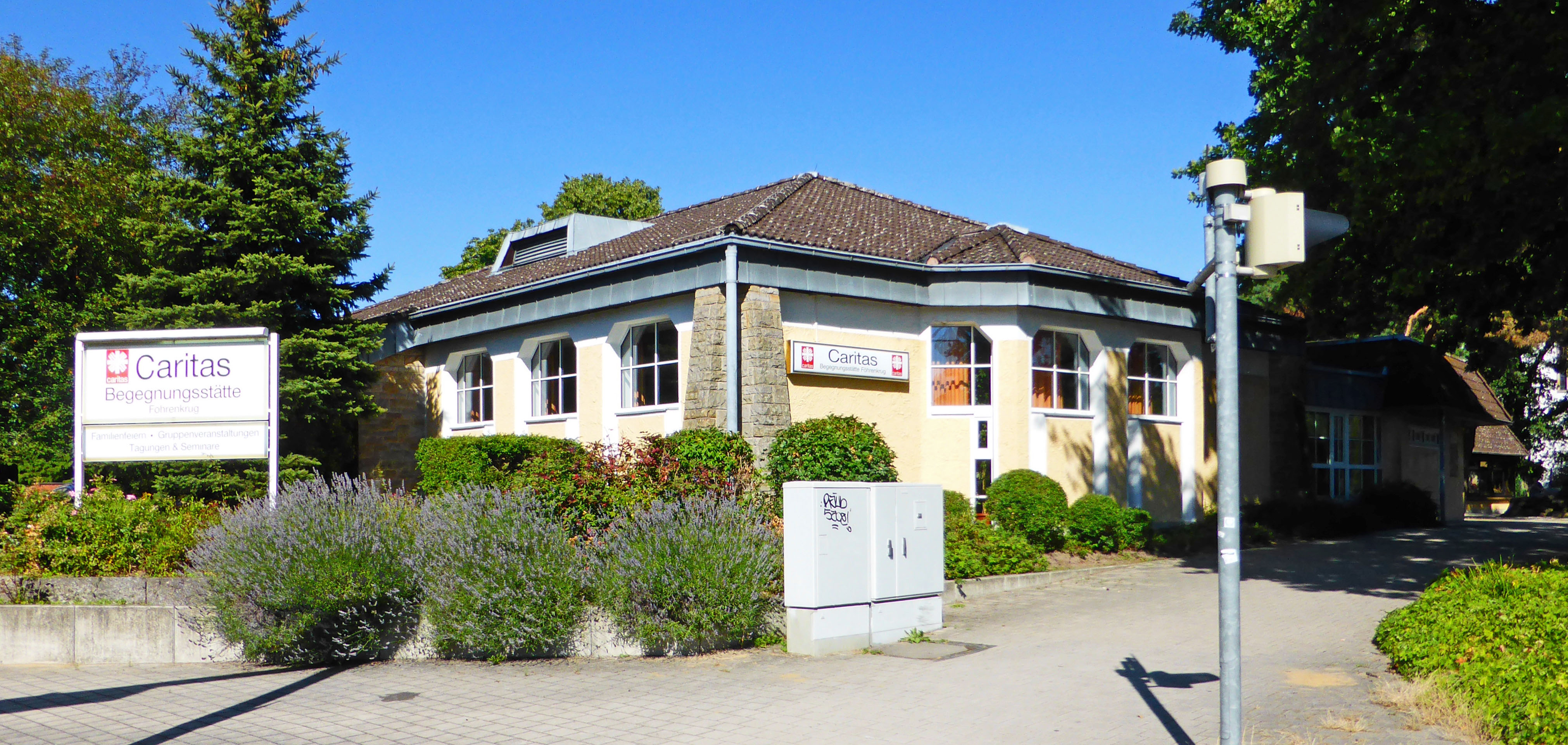 Föhrenkrug in Wolfsburg.